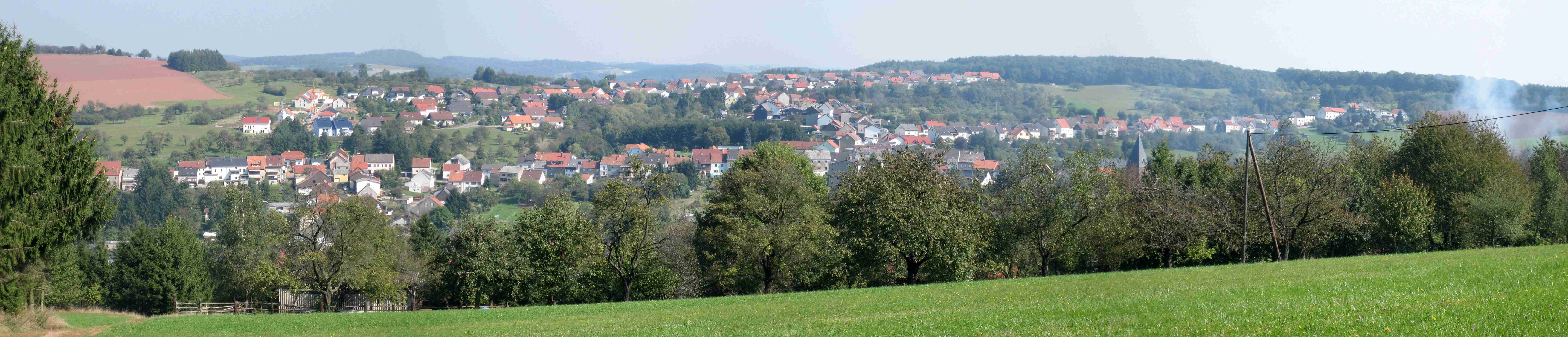 Steinacker (Ortsteil von Humes) vom Wackenberg aus gesehen